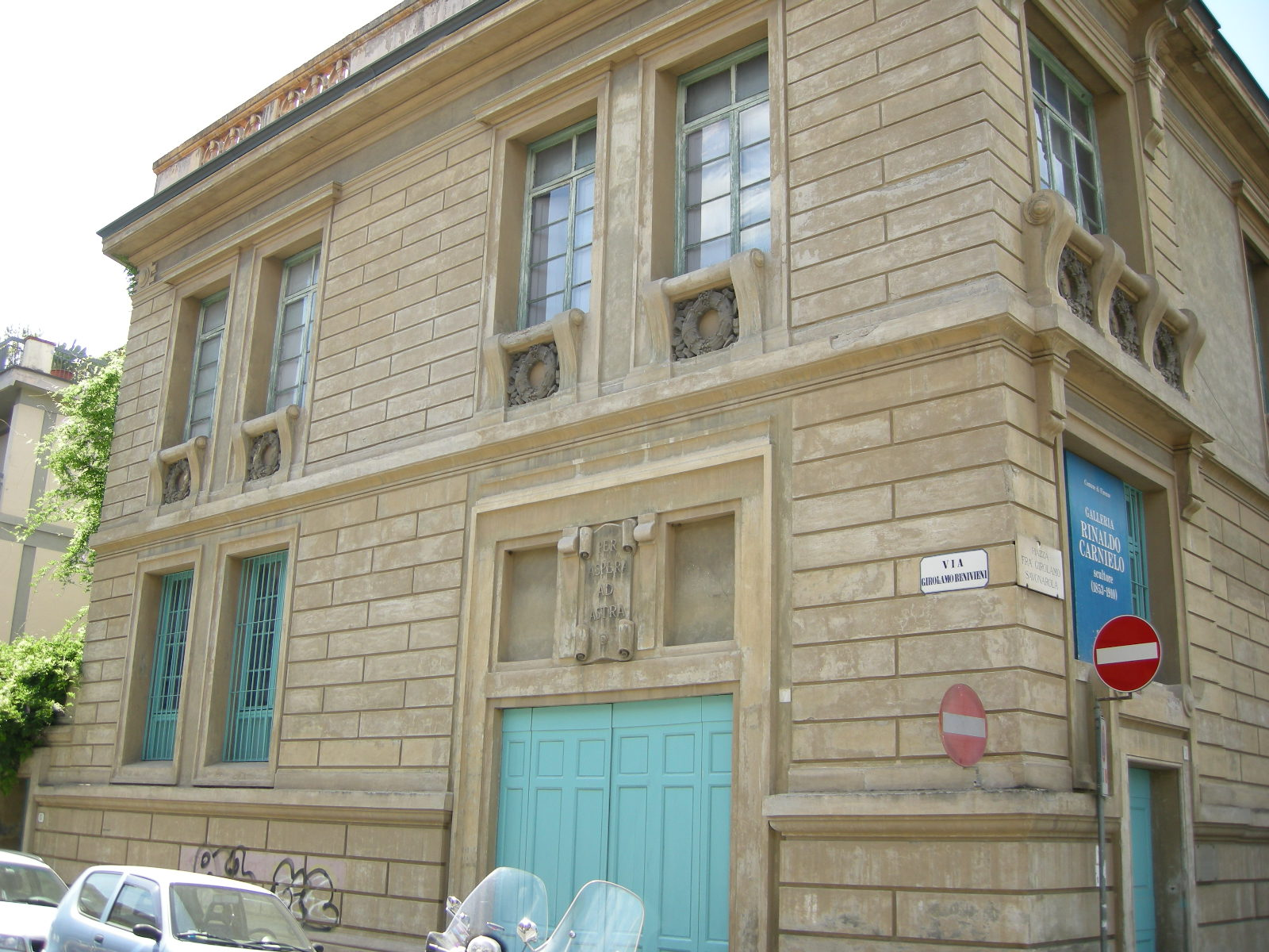 Galleria rinaldo carnielo 13 lato